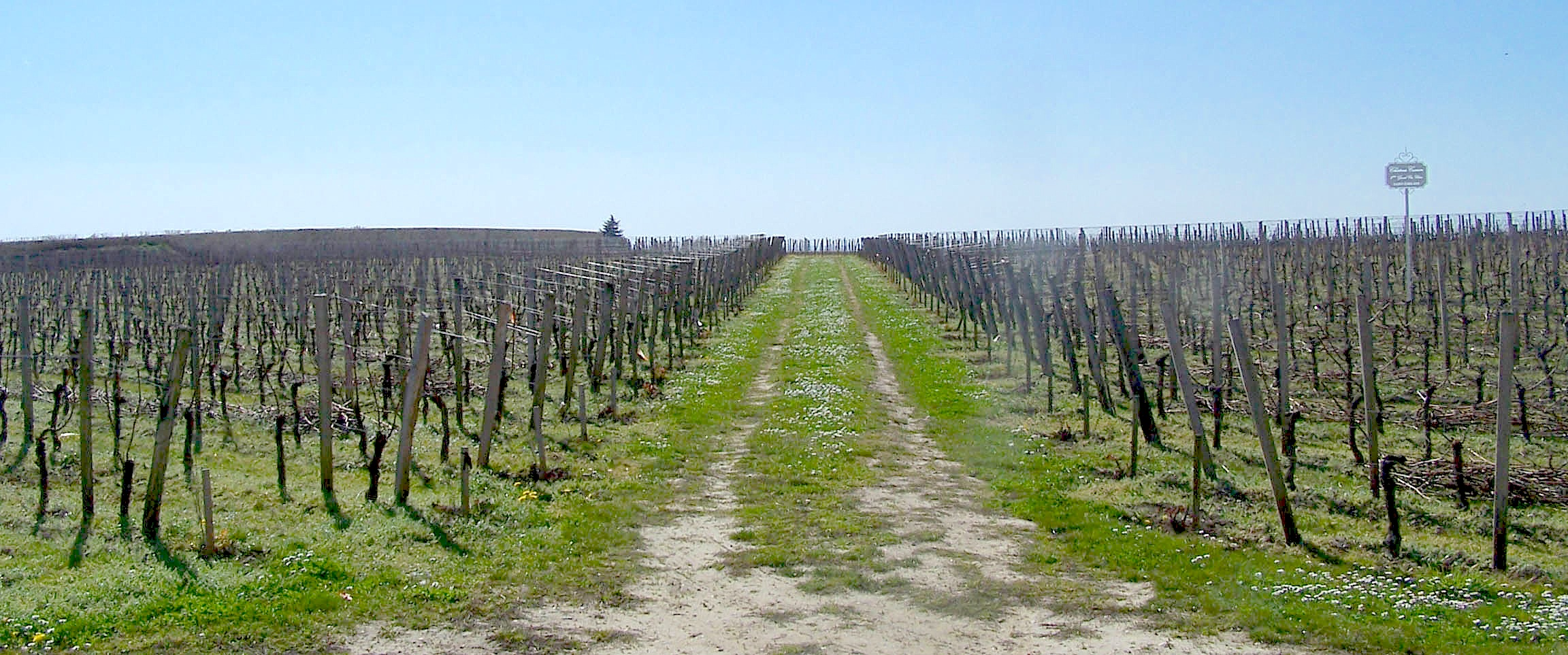 Château Canon, premier grand cru classé Saint-Emilion, sur les hauteurs du village.